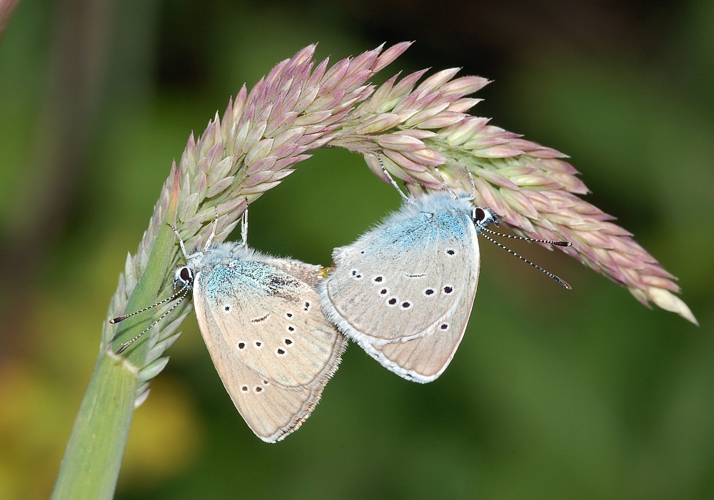 Cyaniris semiargus, Avene, Languedoc-Roussillon, France